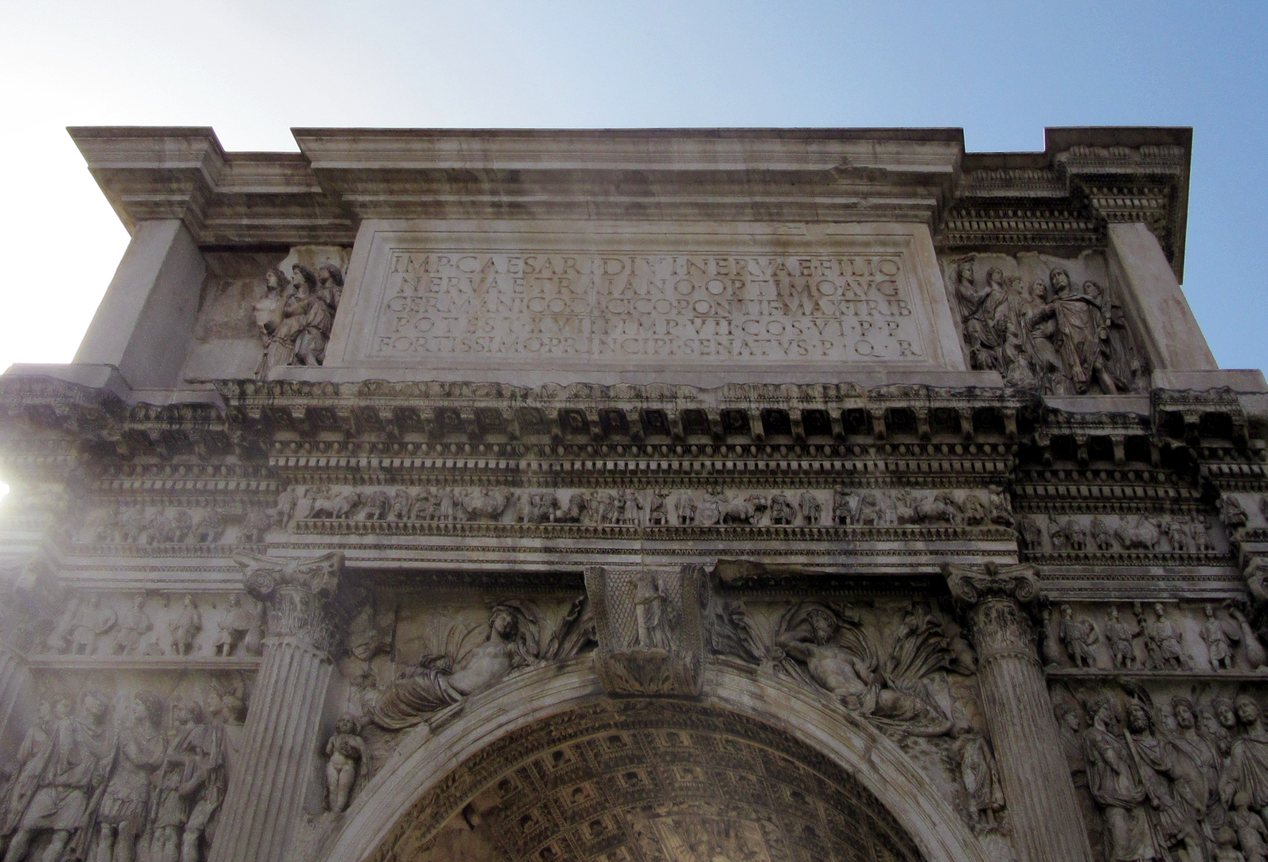 Benevento, Arco di Traiano, attico e iscrizione lato Nord-Est